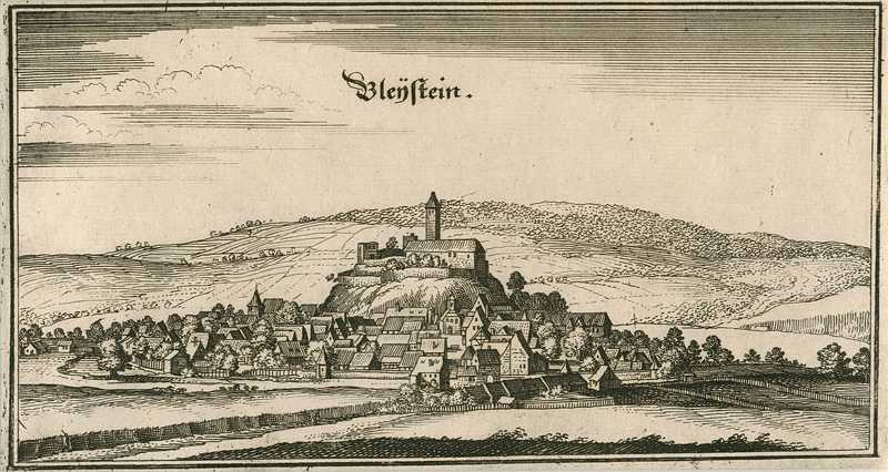 Kupferstich von Pleystein (Bayern) in der "Topographia Germaniae des Matthaeus Merian" um 1644